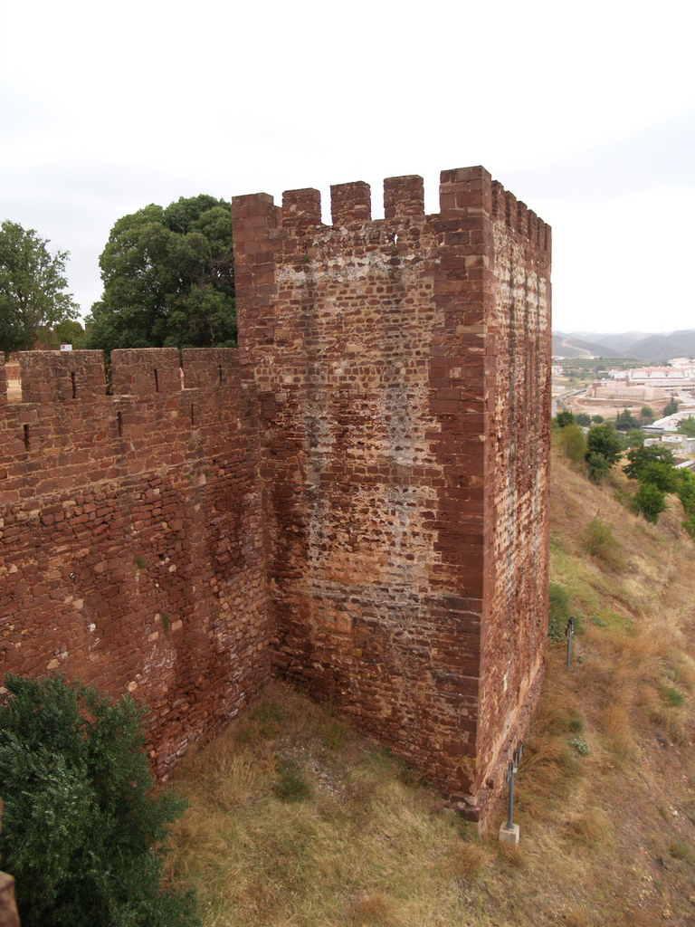 Silves Castle